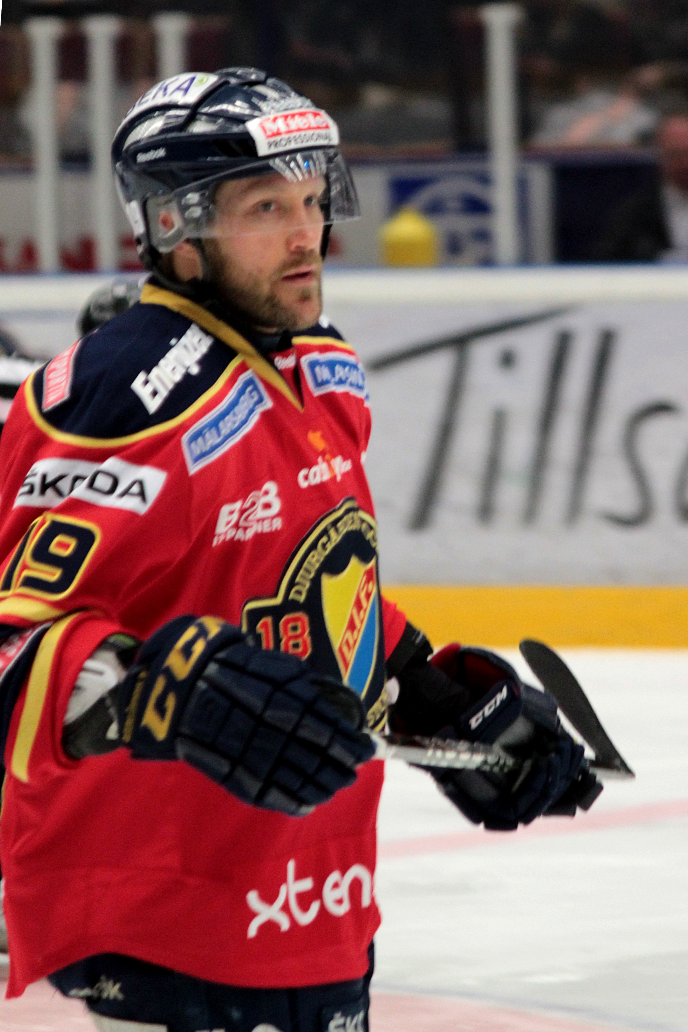 Jimmie Ölvestad i kvalmatchen mellan Leksands IF och Djurgårdens IF i Leksand 2012-03-31